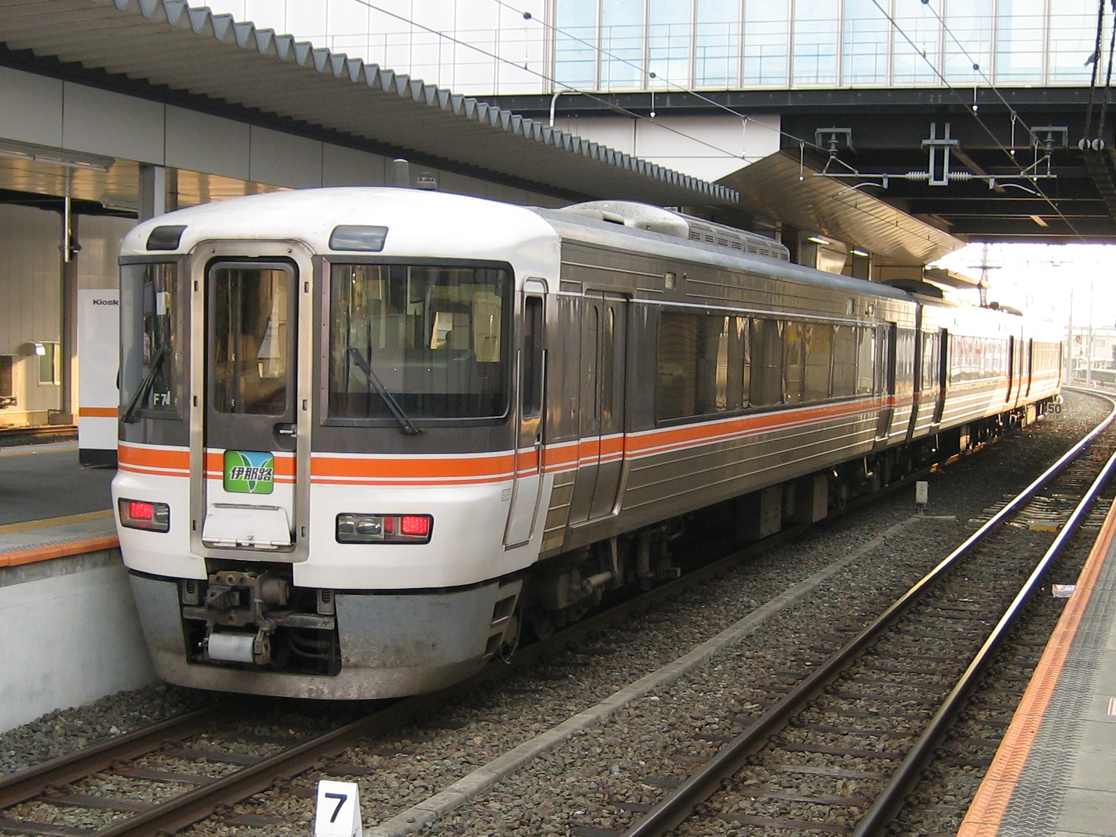 東海旅客鉄道373系特急伊那路